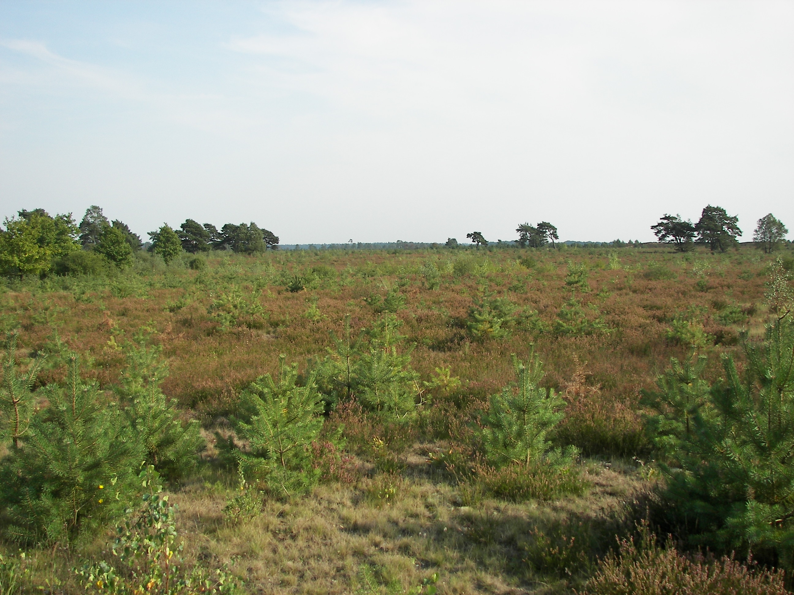 Osterheide bei Schneverdingen, Sandheide stark mit Birken durchsetzt